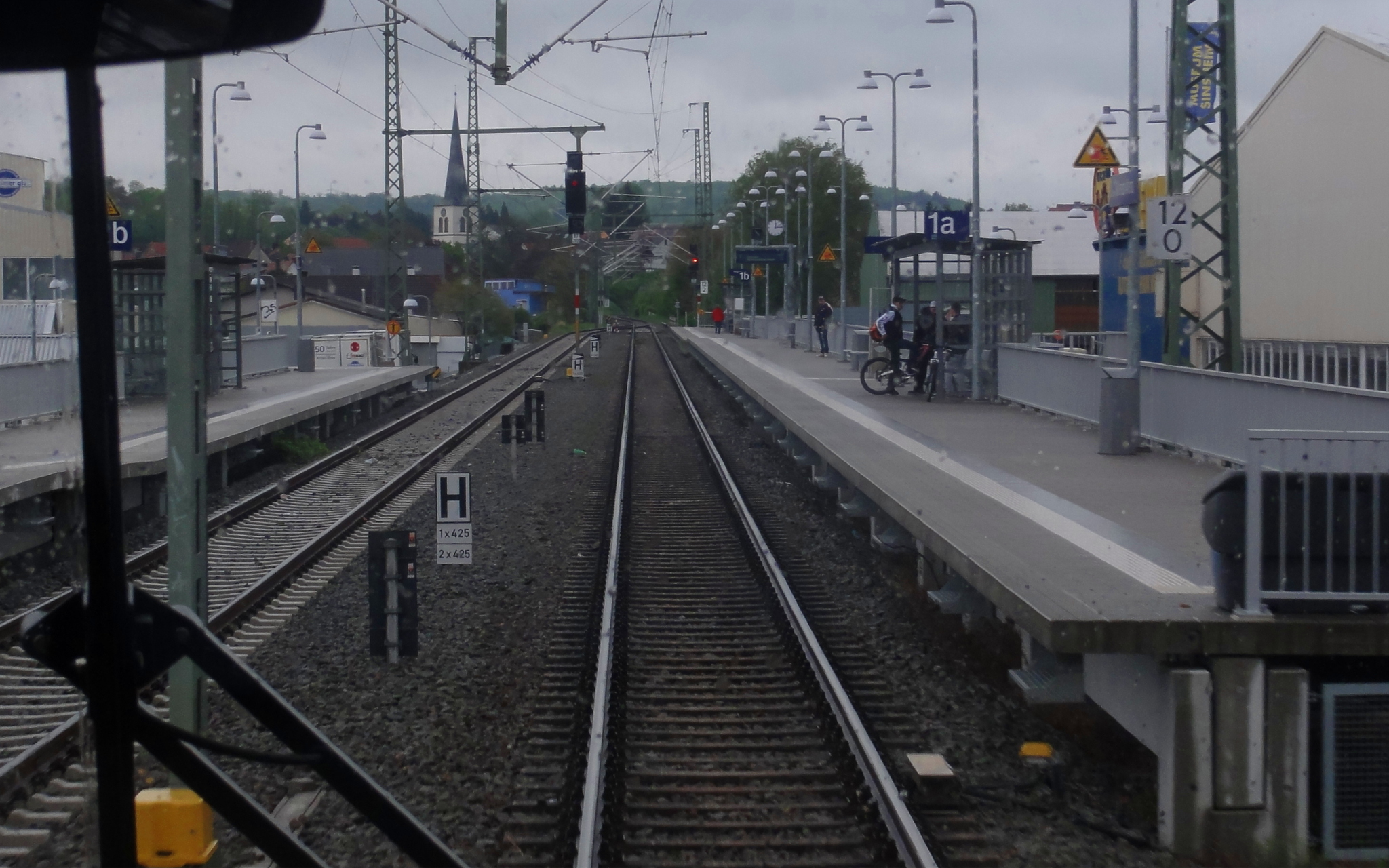 Bahnsteig von Sinsheim Museum/Arena aus der Perspektive eines einfahrenden Zuges.